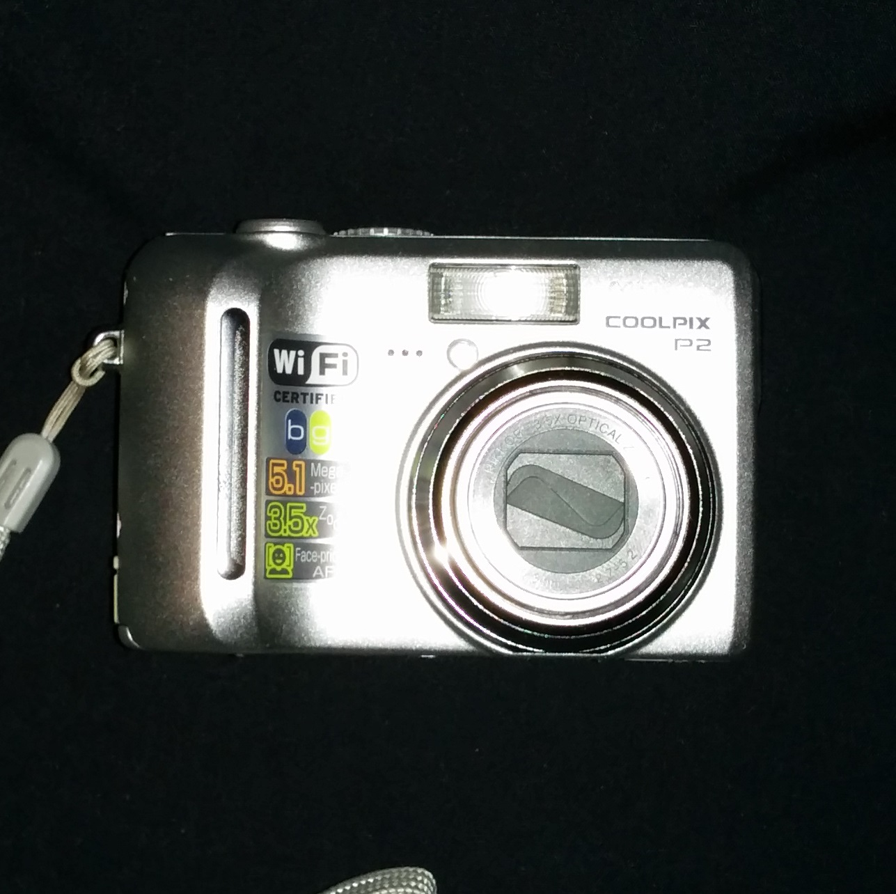 Nikon Coolpix P2